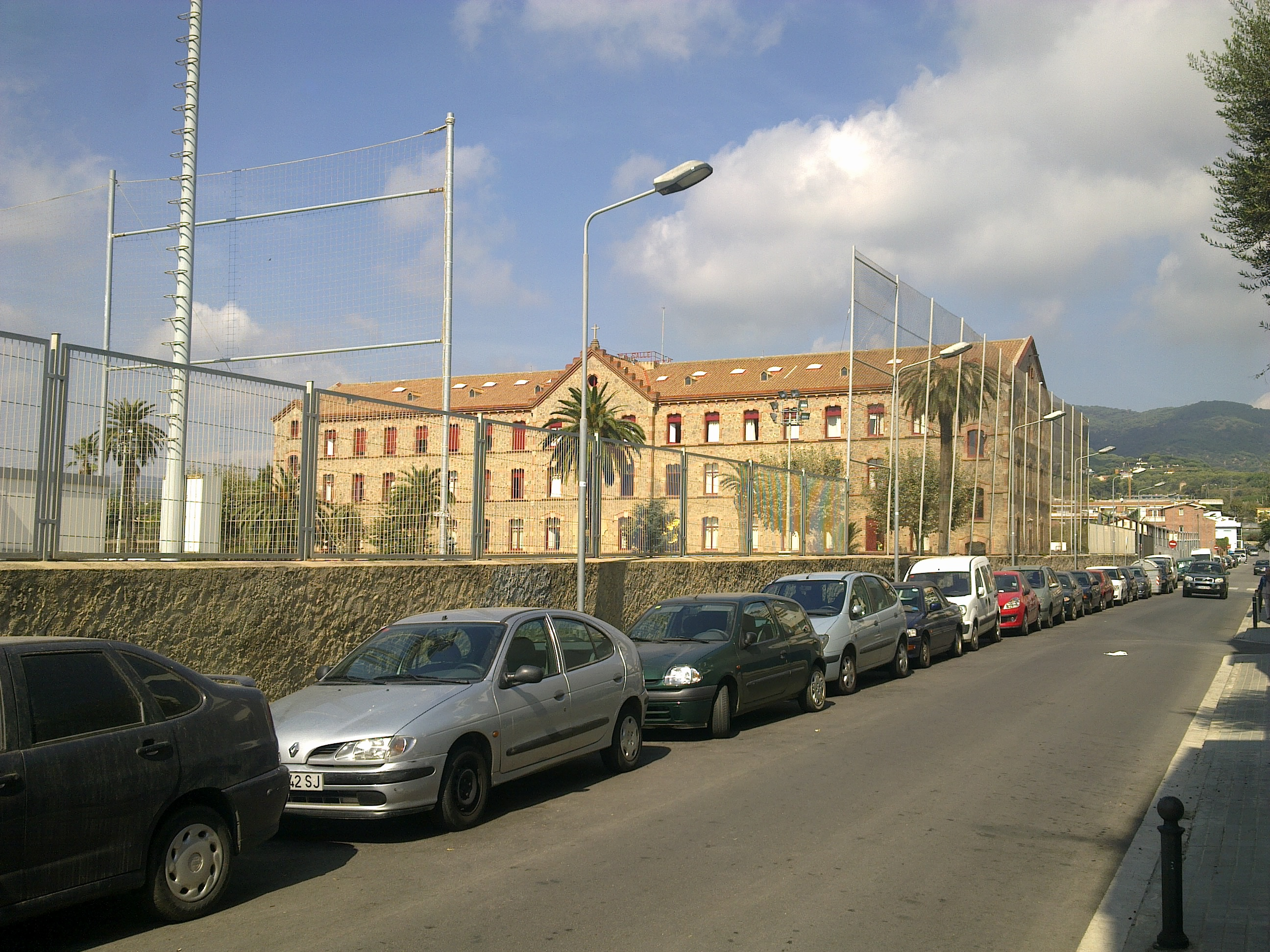 La Salle de Premià de Mar (Maresme)